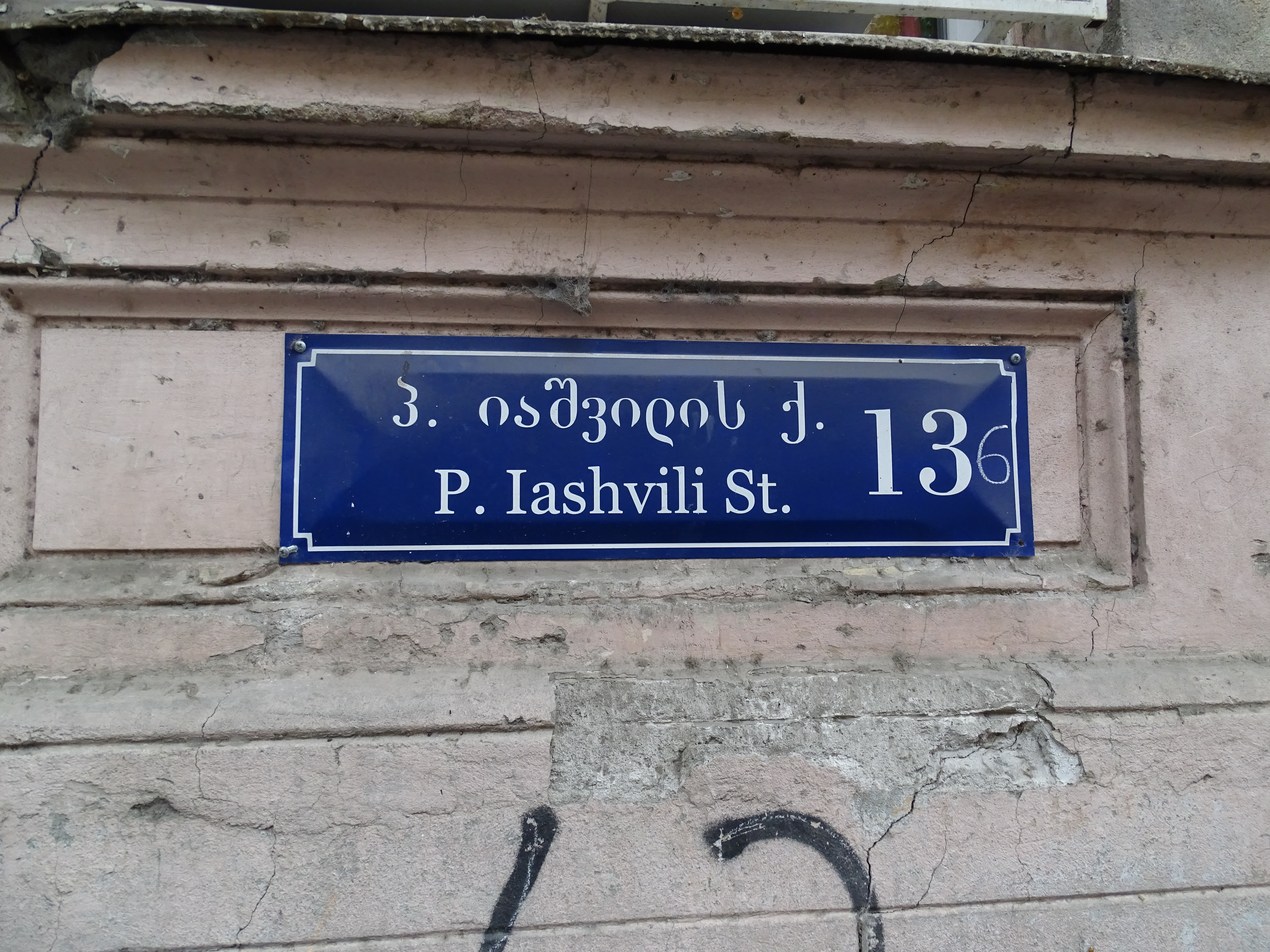 Straßenschild in Tiflis. P. Ivashvili Str.